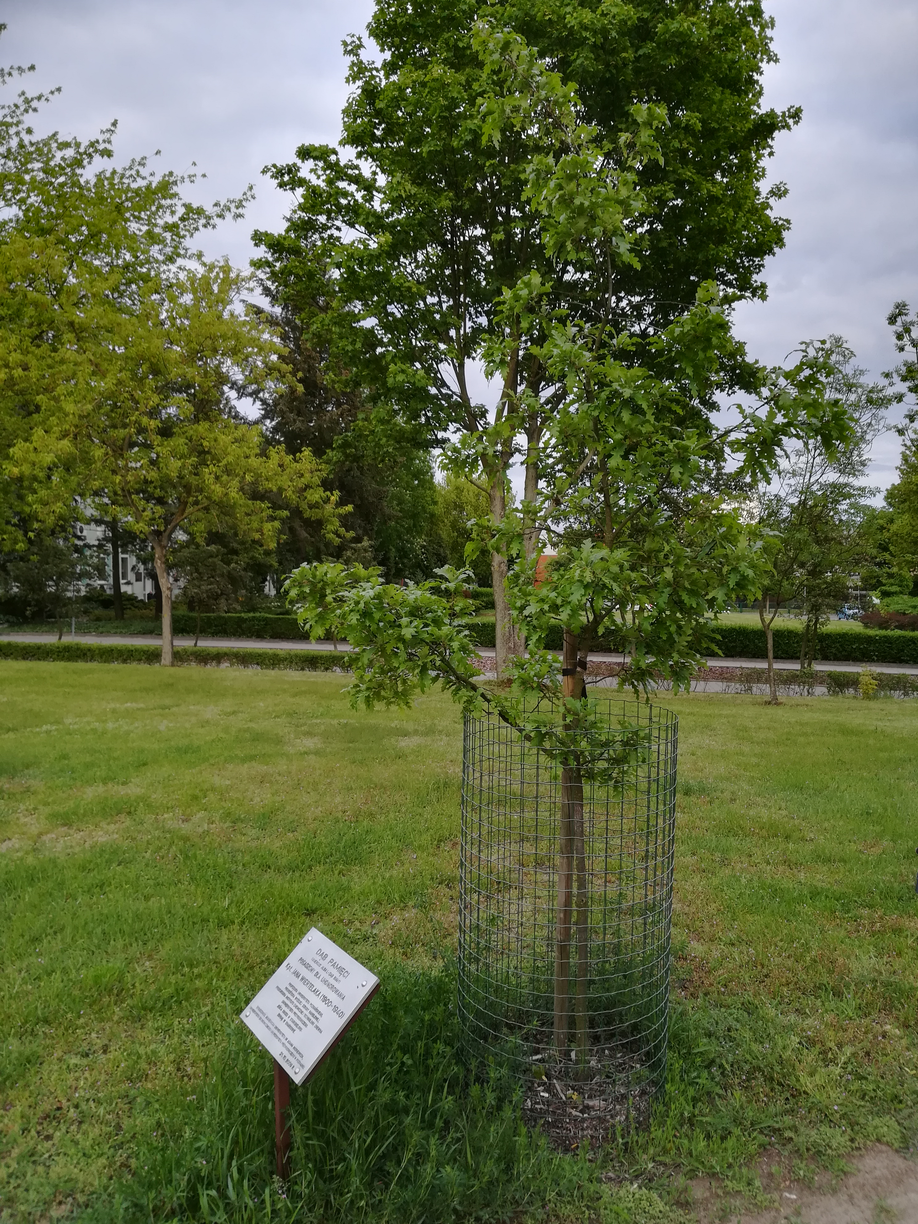 Dąb Wiertelaka przy Uniwersytecie Przyrodniczym w Poznaniu.